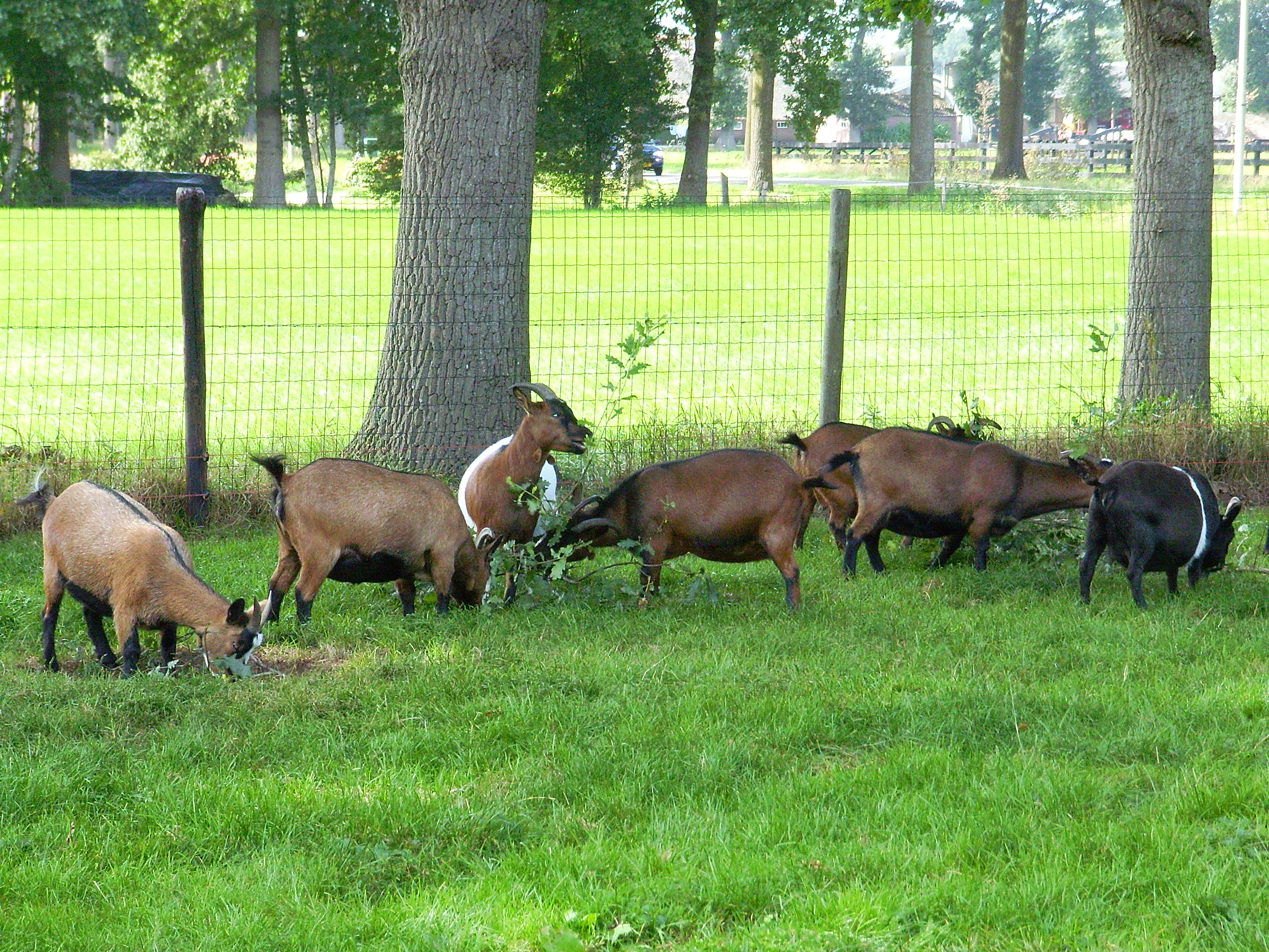 Dwerggeiten